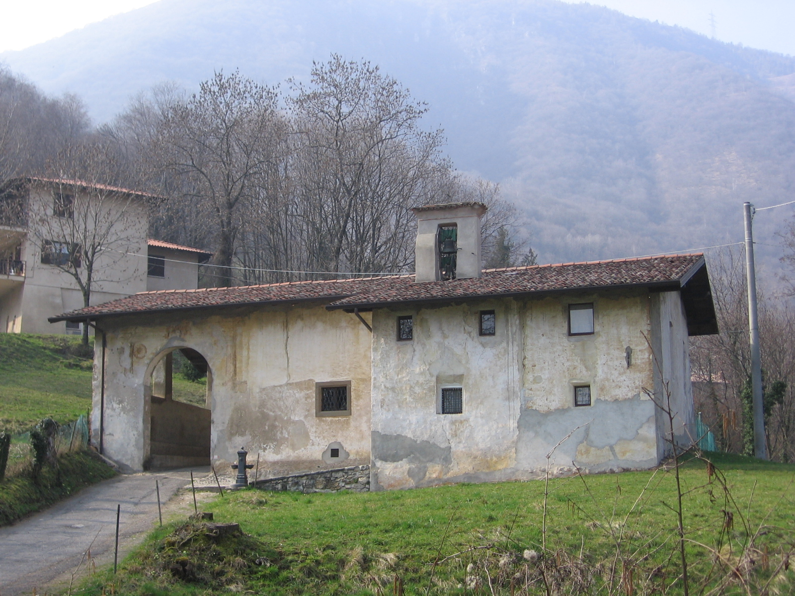 Santuario Madonna della Neve, Albino, Bergamo, Italy